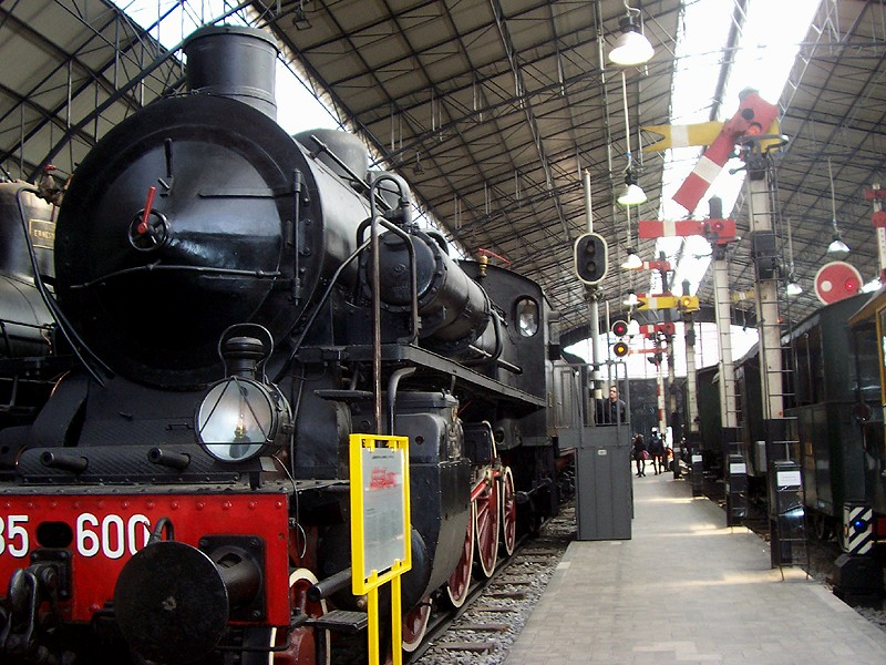 Milano - Padiglione Ferroviario al Museo della Scienza e della Tecnica "Leonardo da Vinci"